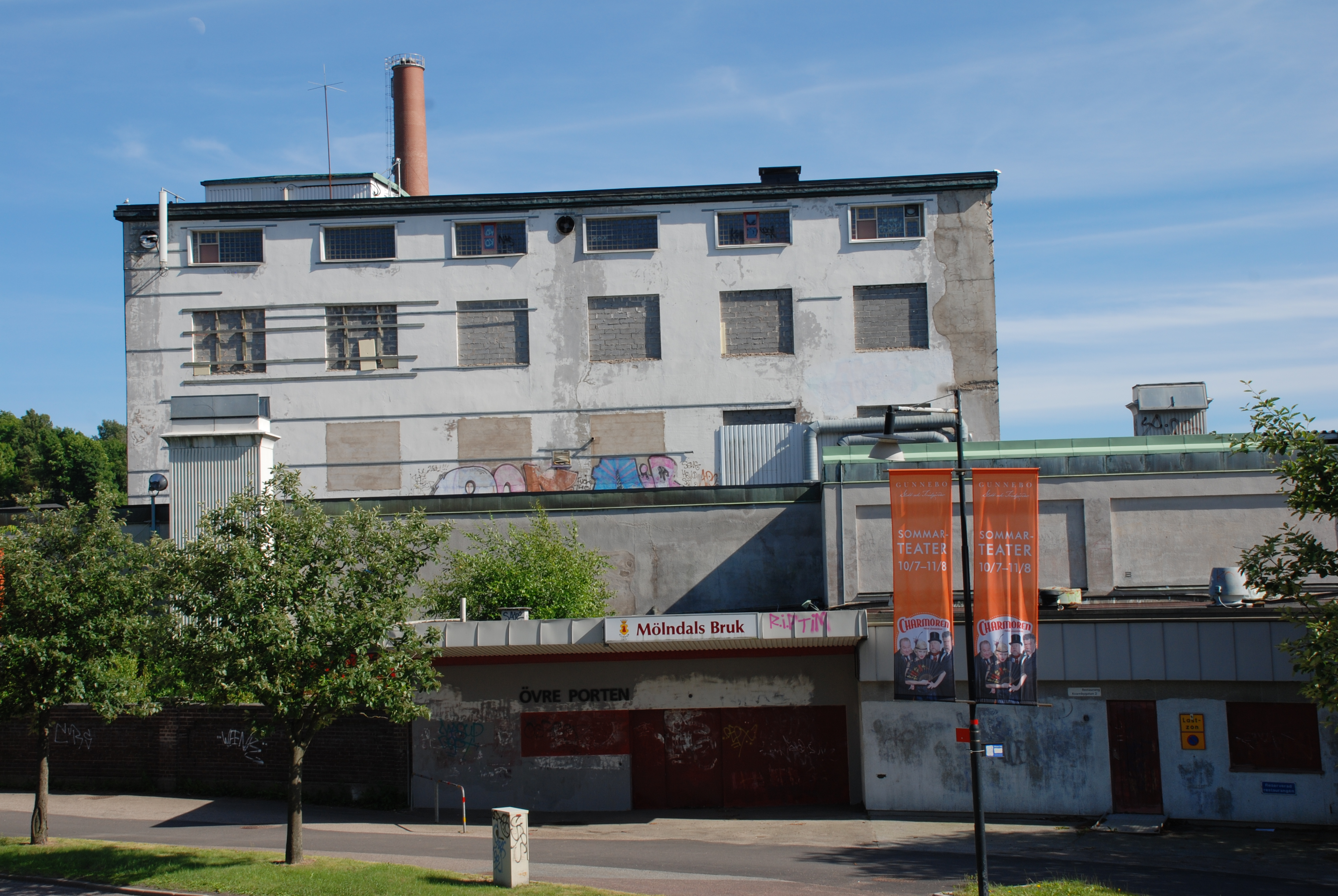 Papyrus pappersbruk i Mölndal. Övre porten mot Kvarnbygatan och byggnad 6 - kartongfabriken.